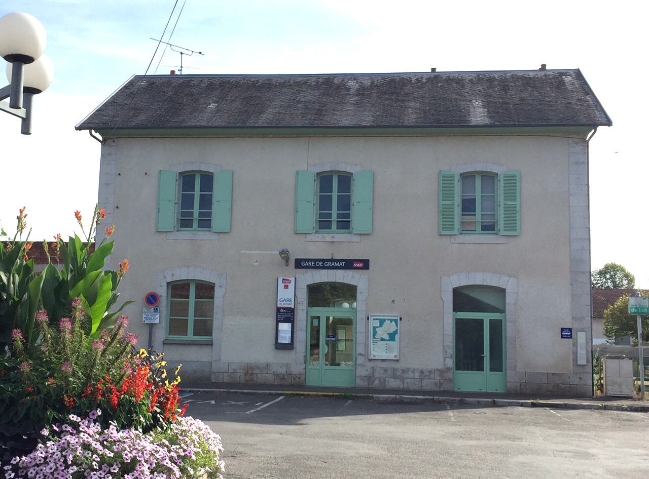 La gare SNCF de Gramat (Lot), entrée